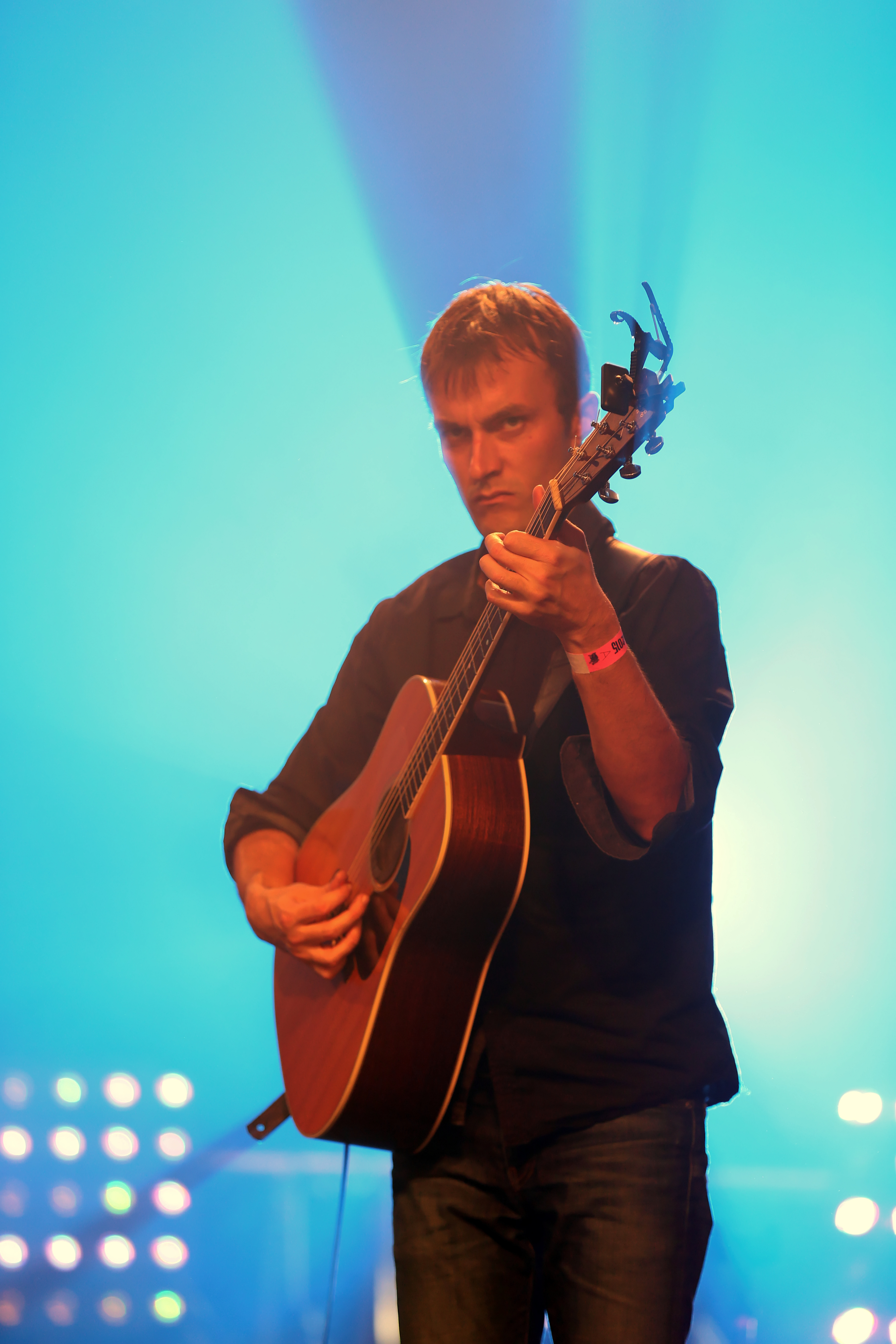 Startijenn en fest-noz lors du festival Yaouank le 21 novembre 2015 au Parc des Expositions de Rennes.